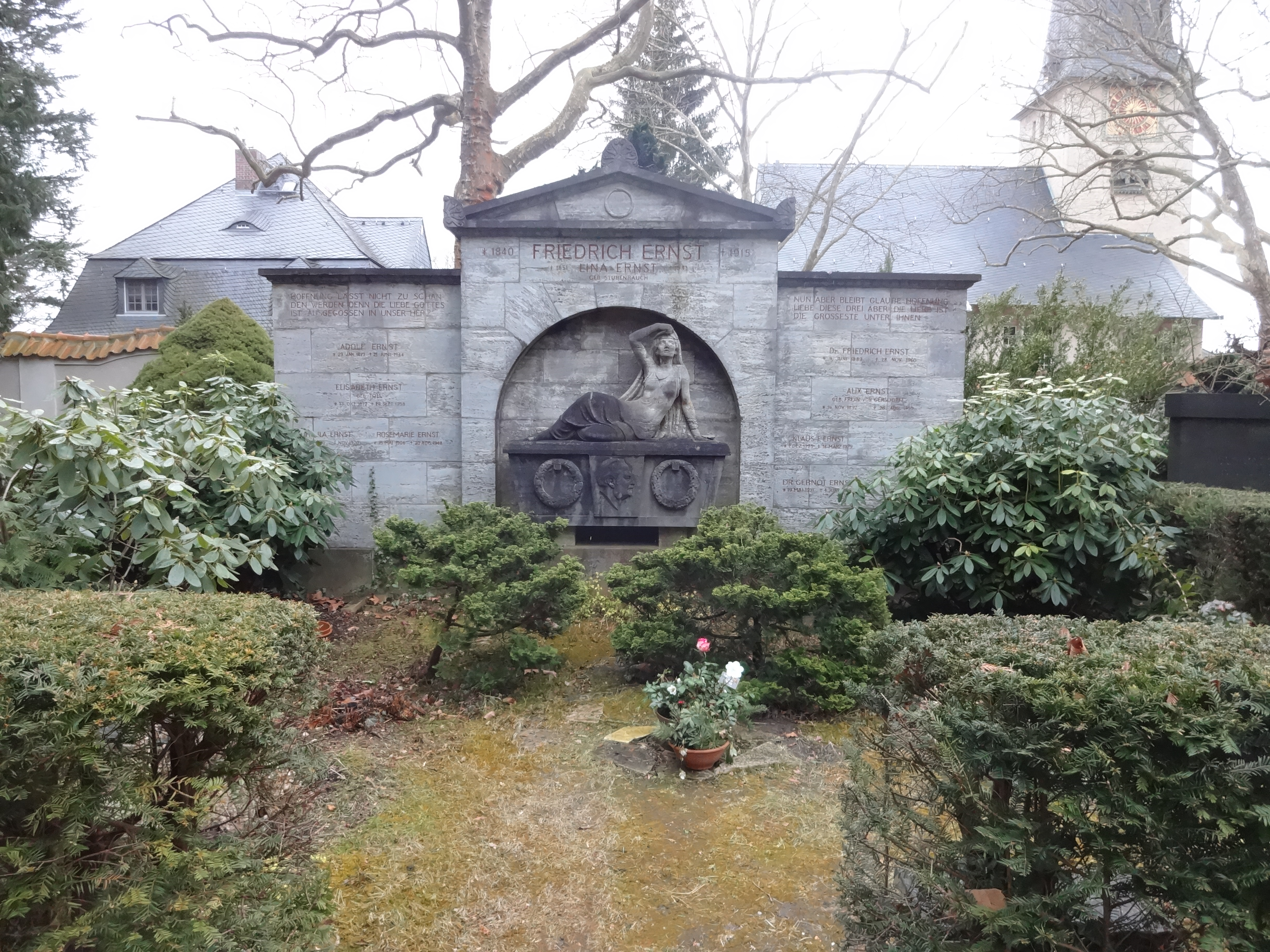 Grabstätte Familie Friedrich Ernst (unter anderem Bankier Friedrich Ernst (1889-1960) auf dem Evangelischen Kirchhof Nikolassee